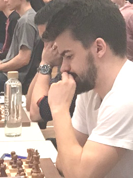 Jan-Christian Schröder, Runde 9 der Grenke Chess Open 2019 in Karlsruhe.